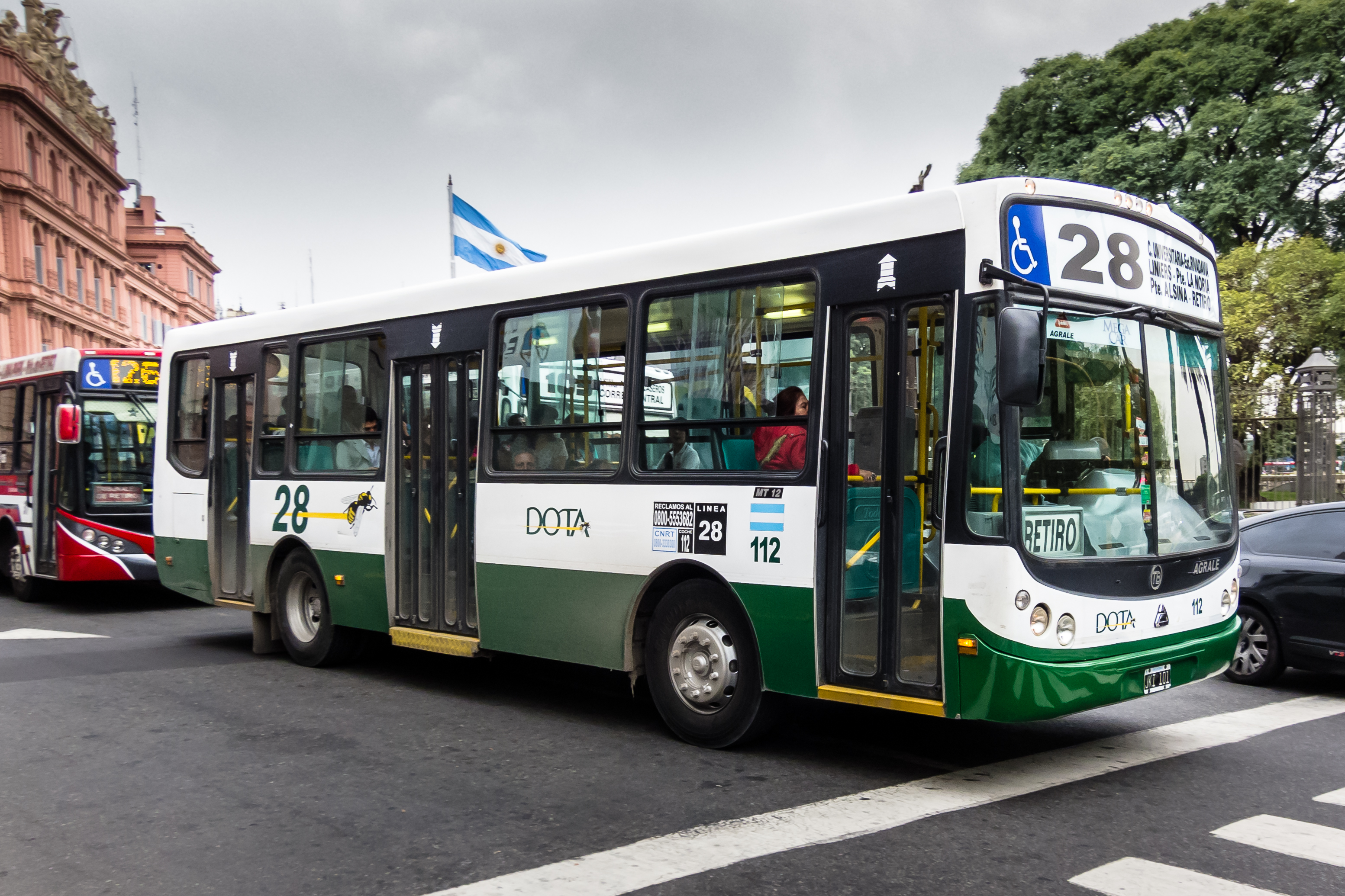 Colectivo de la Línea 28, interno 112, carrocería Todo Bus Pompeya, chasis Agrale MT 12, matrícula JKI101. Buenos Aires, Argentina.